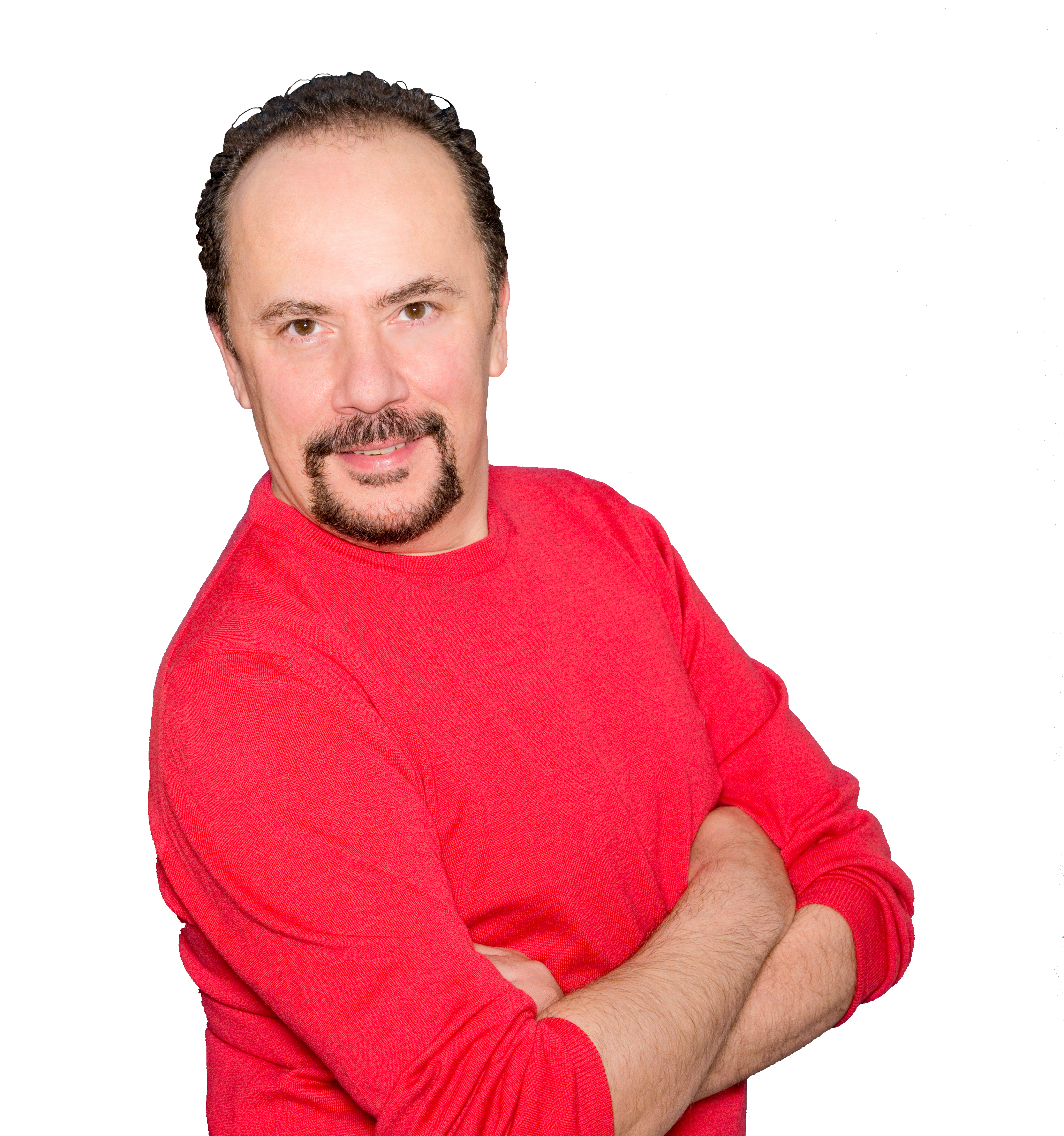 maurizio casagrande